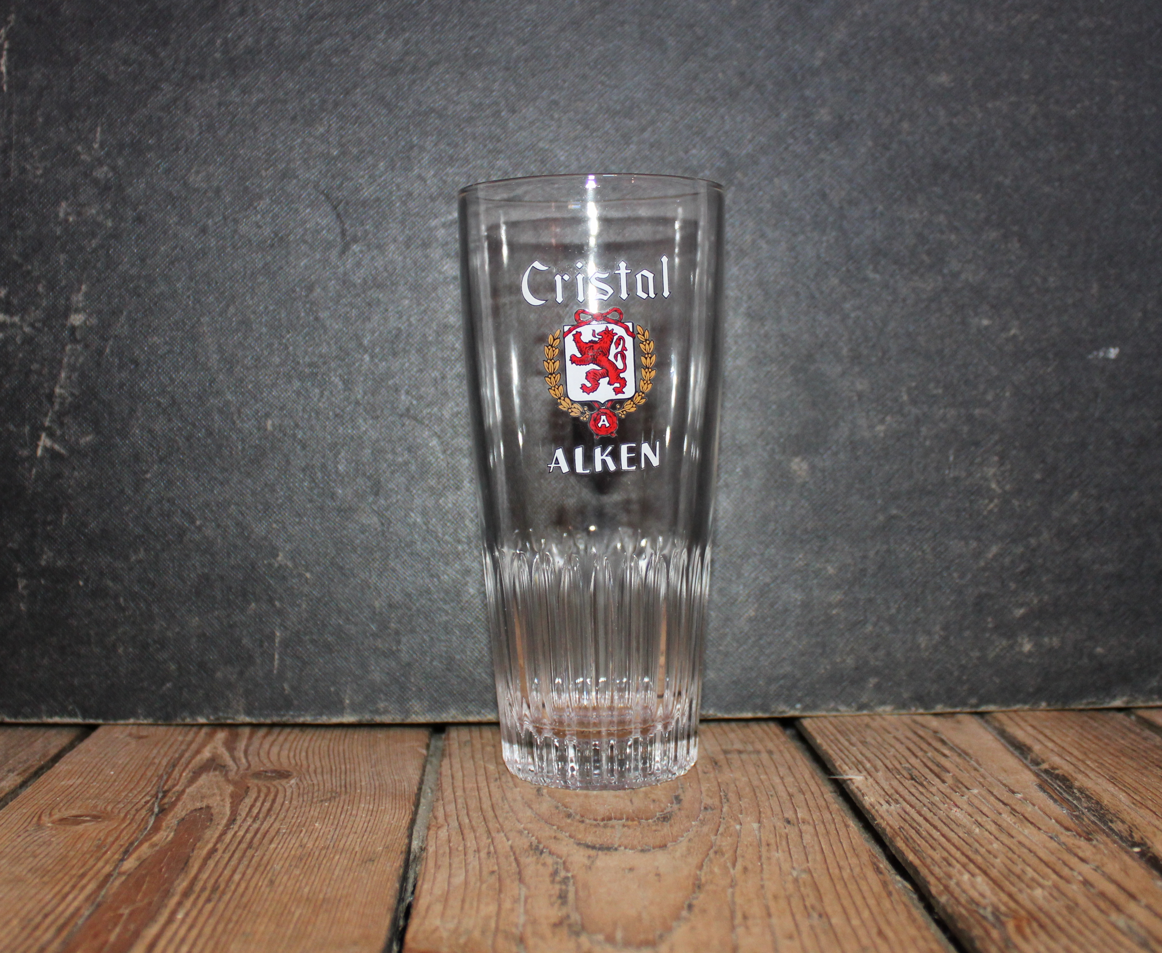 Verre à bière Cristal Alken